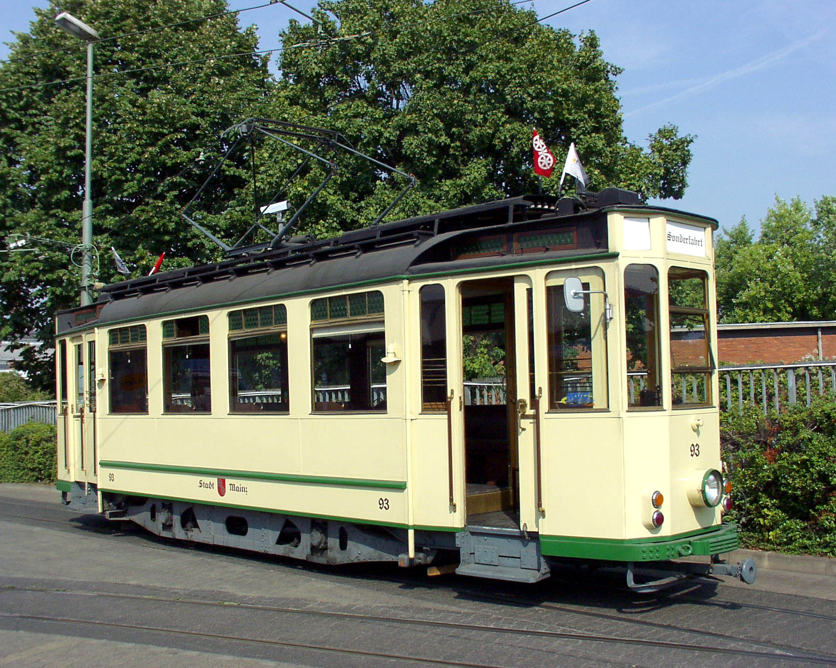 MVG-Triebwagen 93 aus dem Jahre 1929 im Straßenbahndepot Mainz